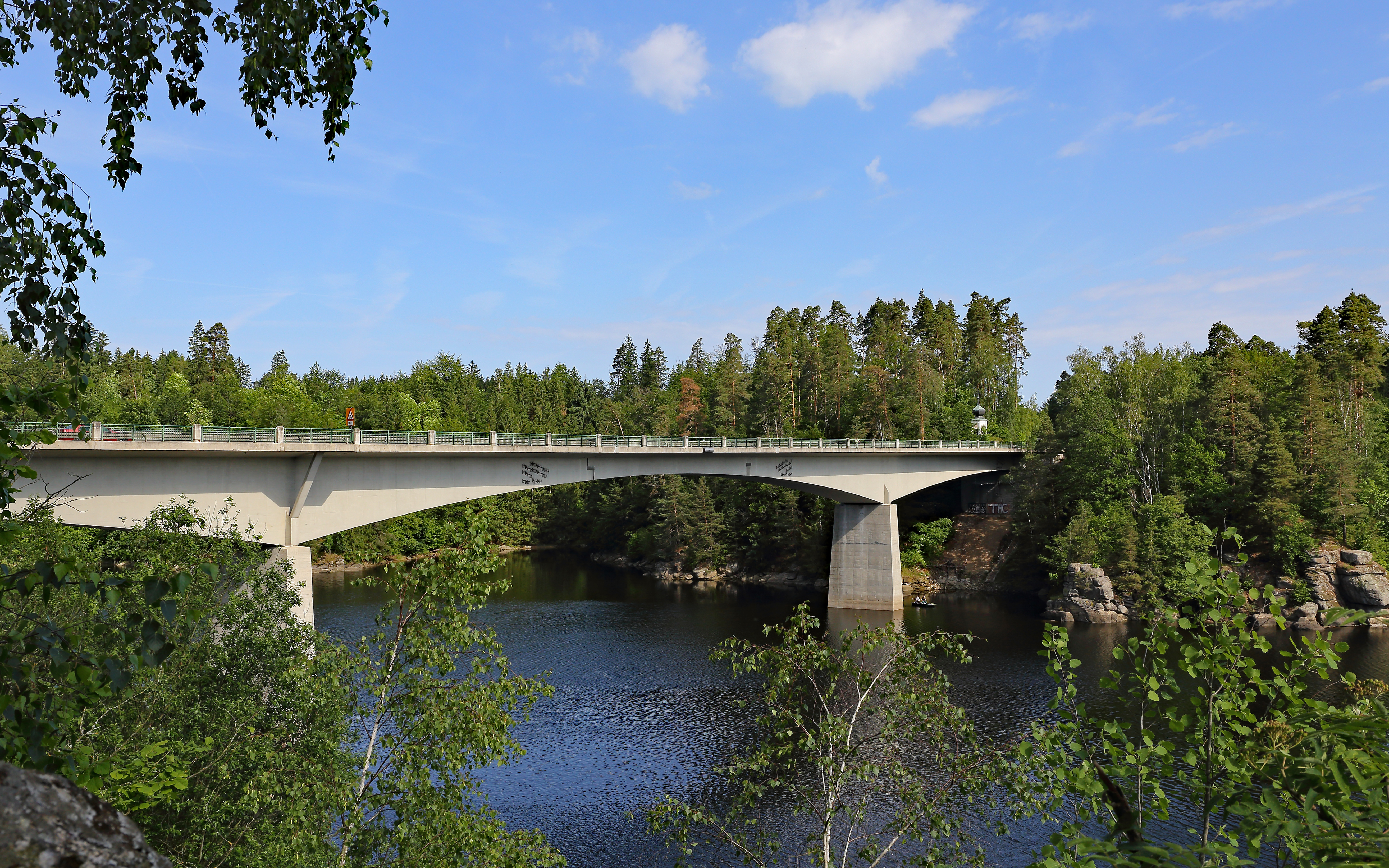 Brücke der Böhmerwald Straße B38 über den Stausee Ottenstein zwischen Friedersbach und Ottenstein.